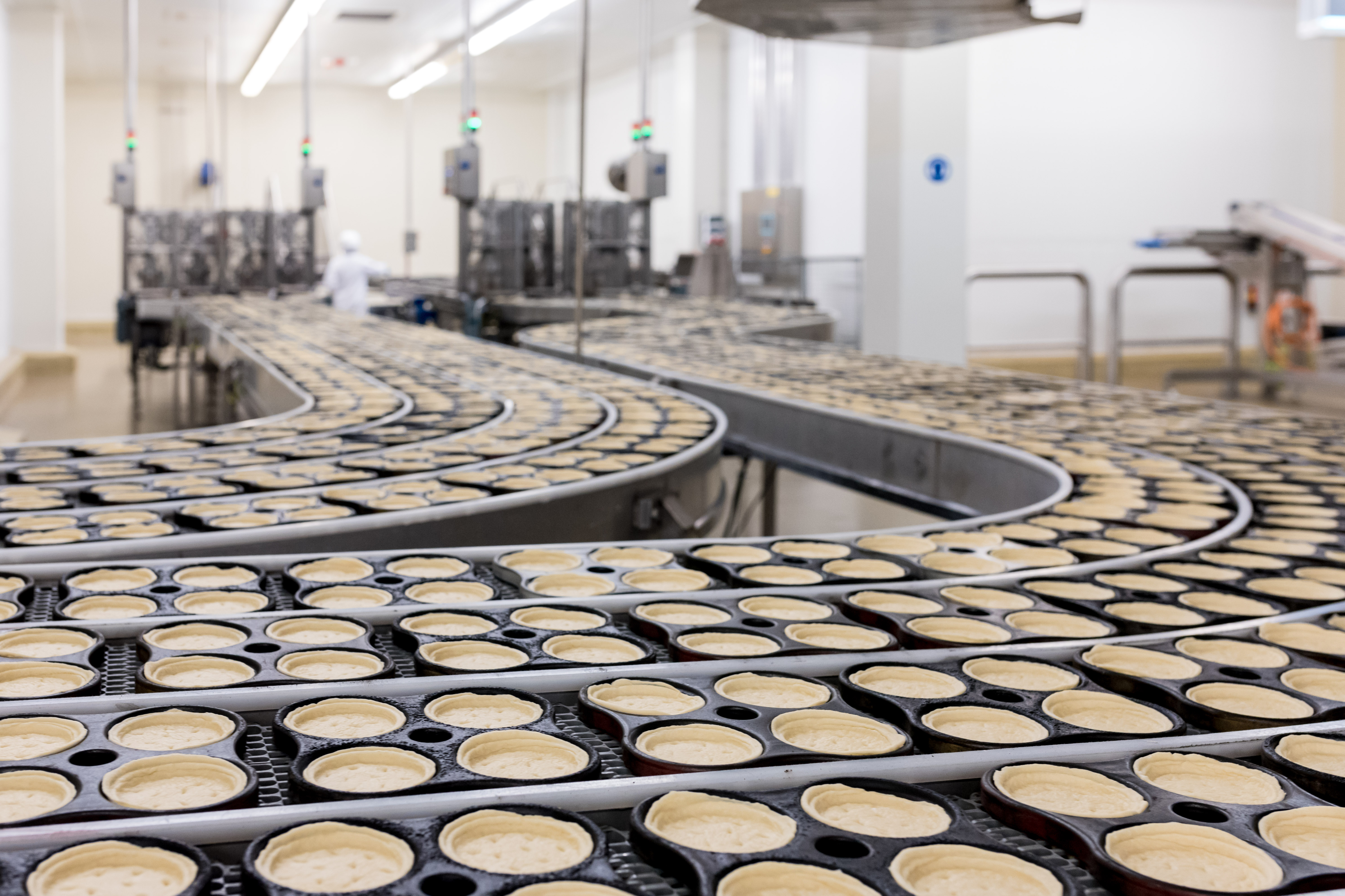 Produktionslinie mit Original Wagner Steinofen Piccolinis